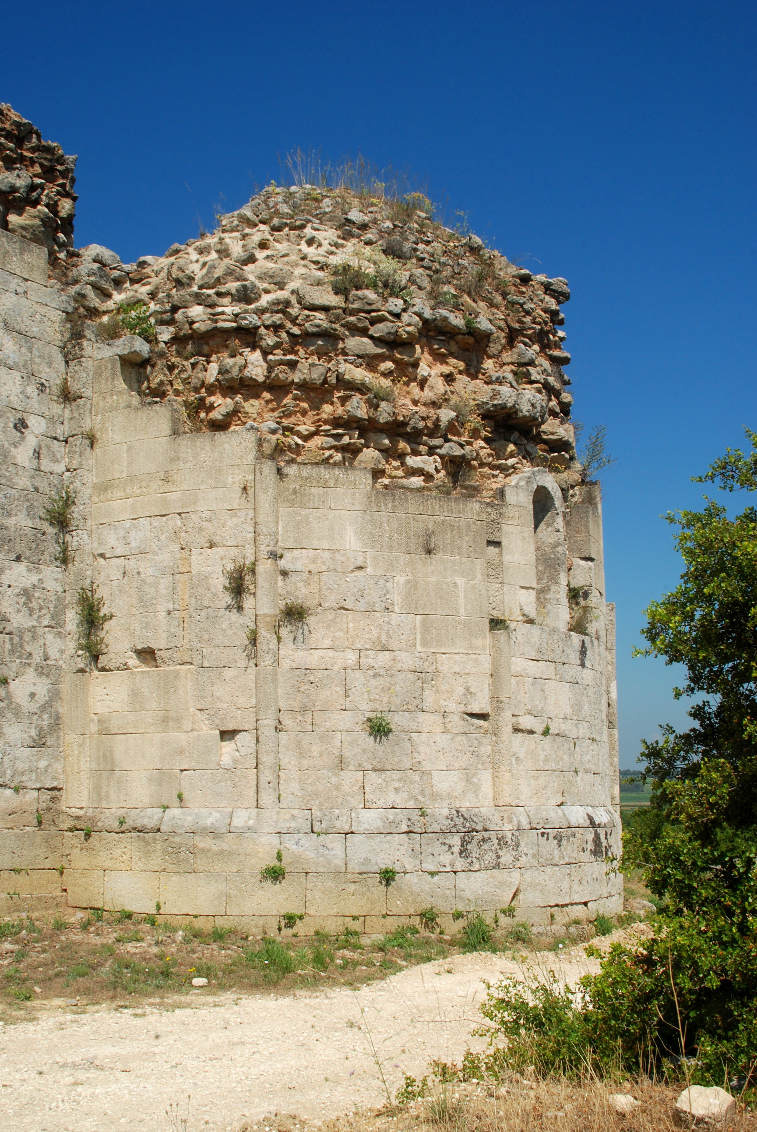 France - Gard - Église Saint-André de Souvignargues